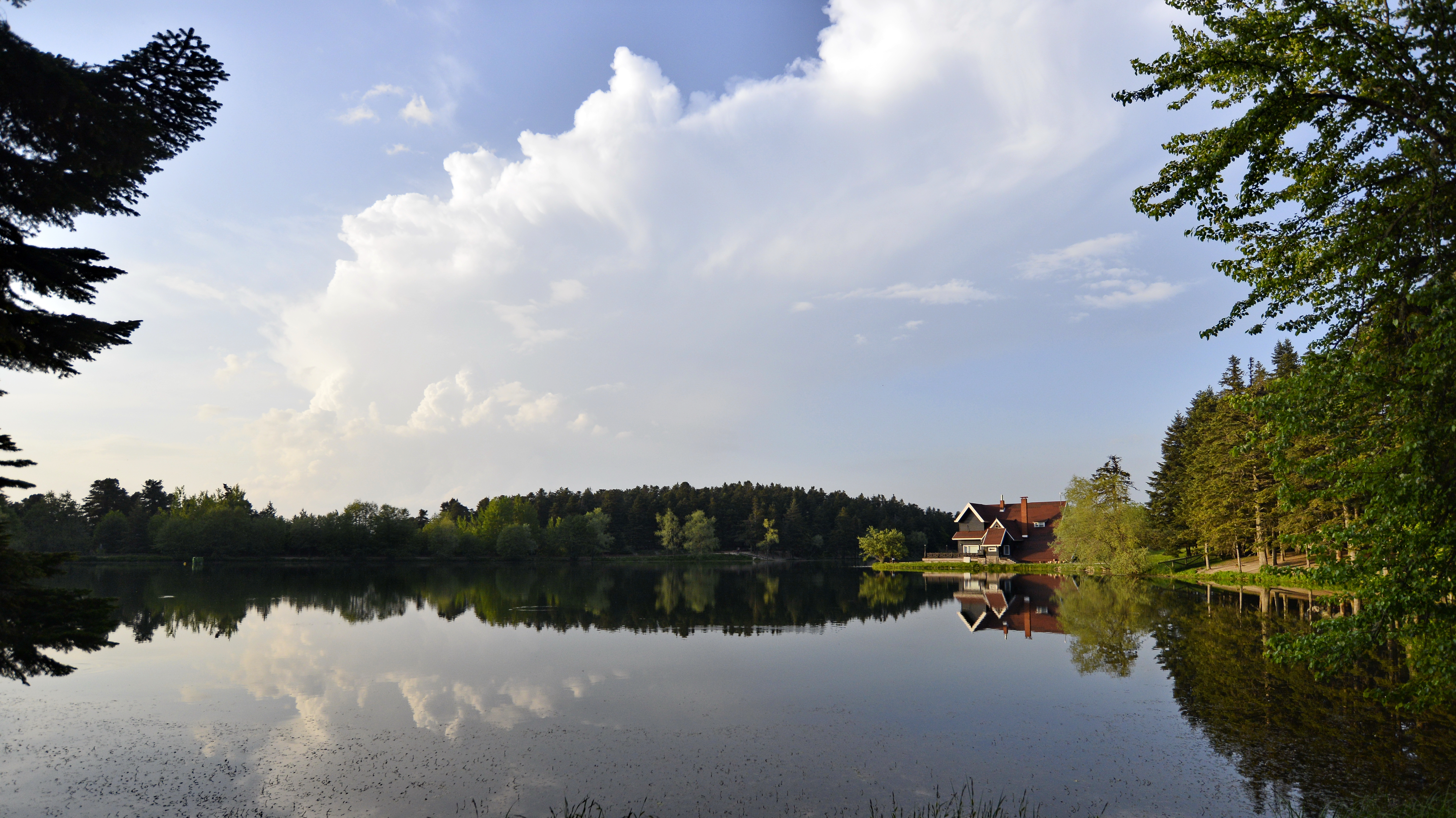 lake reflection photo from Golcuk nature park , Bolu